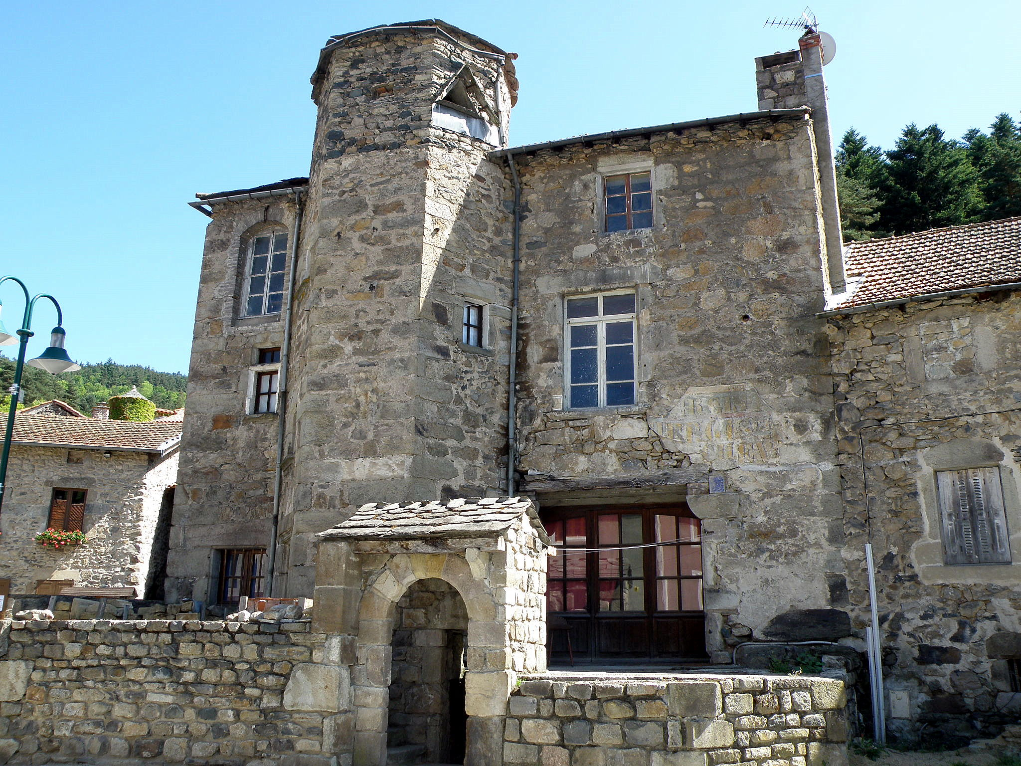 Chamalières-sur-Loire, comm. dans le départ. de la Haute-Loire, France (région Auvergne). Maison patricienne dans le centre de la localité. Remarquer au 1er étage à gauche (photo dans la plus haute résolution) : fenêtre à meneau et à linteau en accolade.